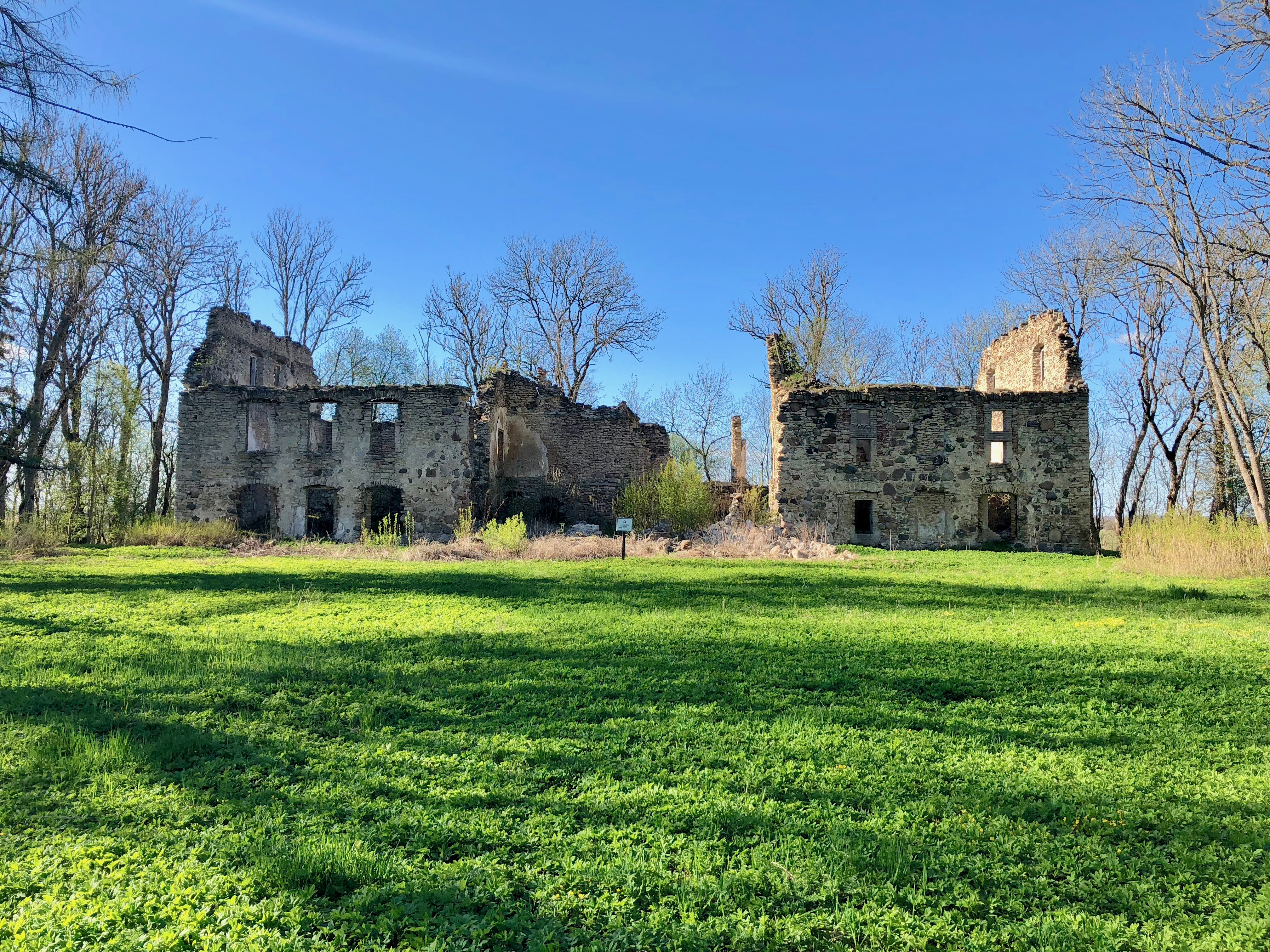 Kloostri mõisa peahoone varemed